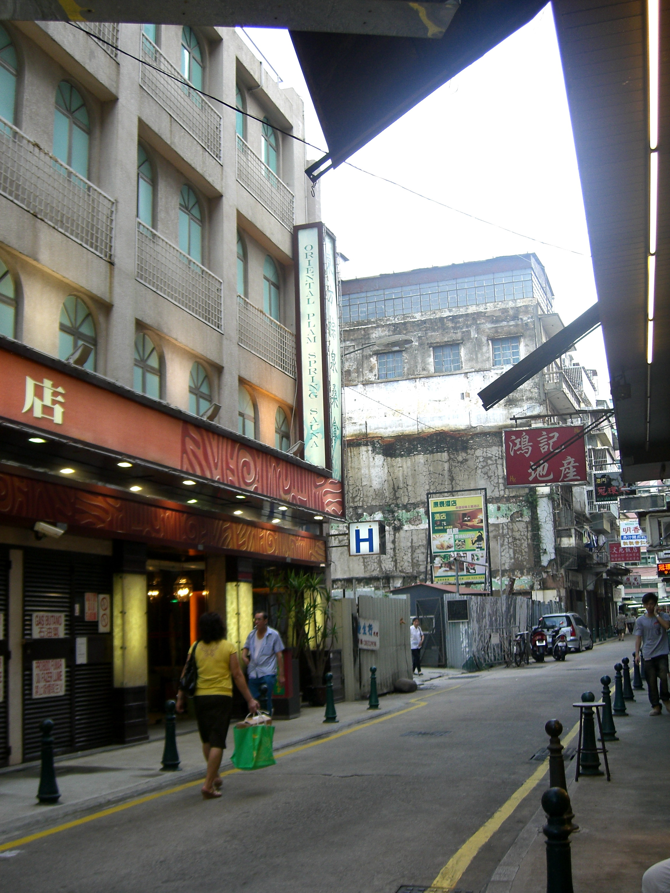 Rua de Cinco de Outubro